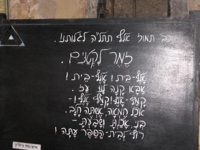 תערוכה העוסקת בחיי הילדים במושבה ראשון-לציון מראשיתה ועד קום המדינה. כאן: במלאת 120 שנה לבית הספר חביב, בית הספר העברי הראשון בארץ.